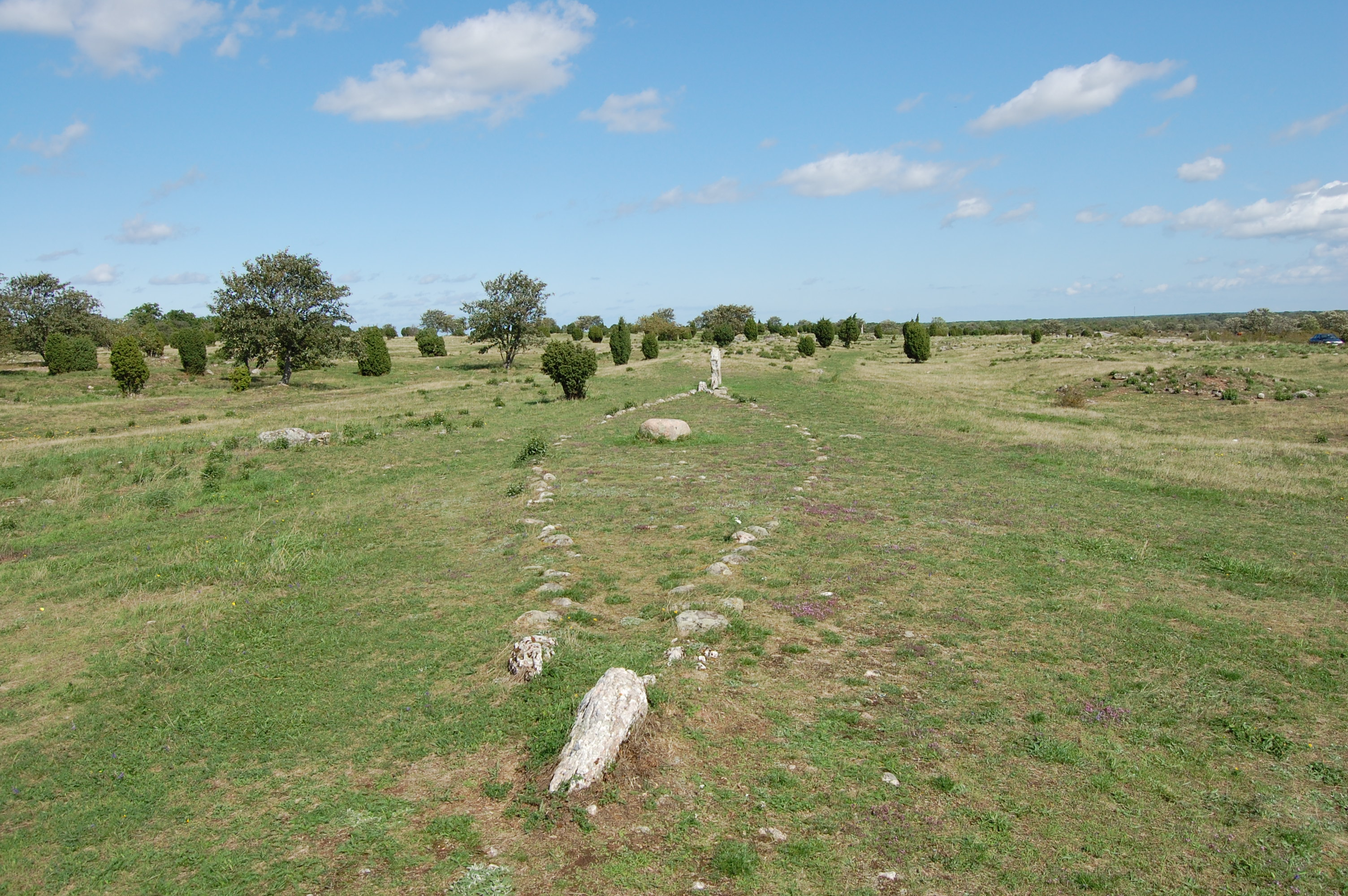 Noahs Arche auf Karums Alvar, Öland, Schiffssetzung